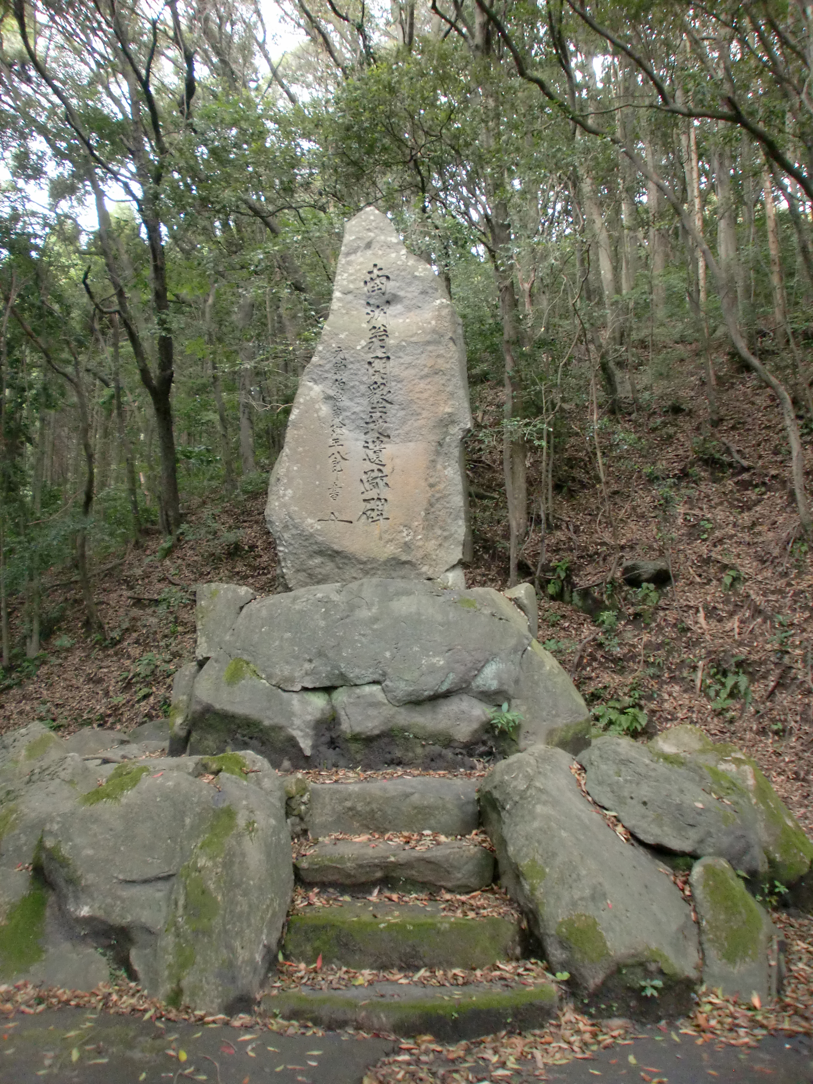 鹿児島市吉野町寺山にある南洲翁開墾地遺跡碑（東郷平八郎書）。